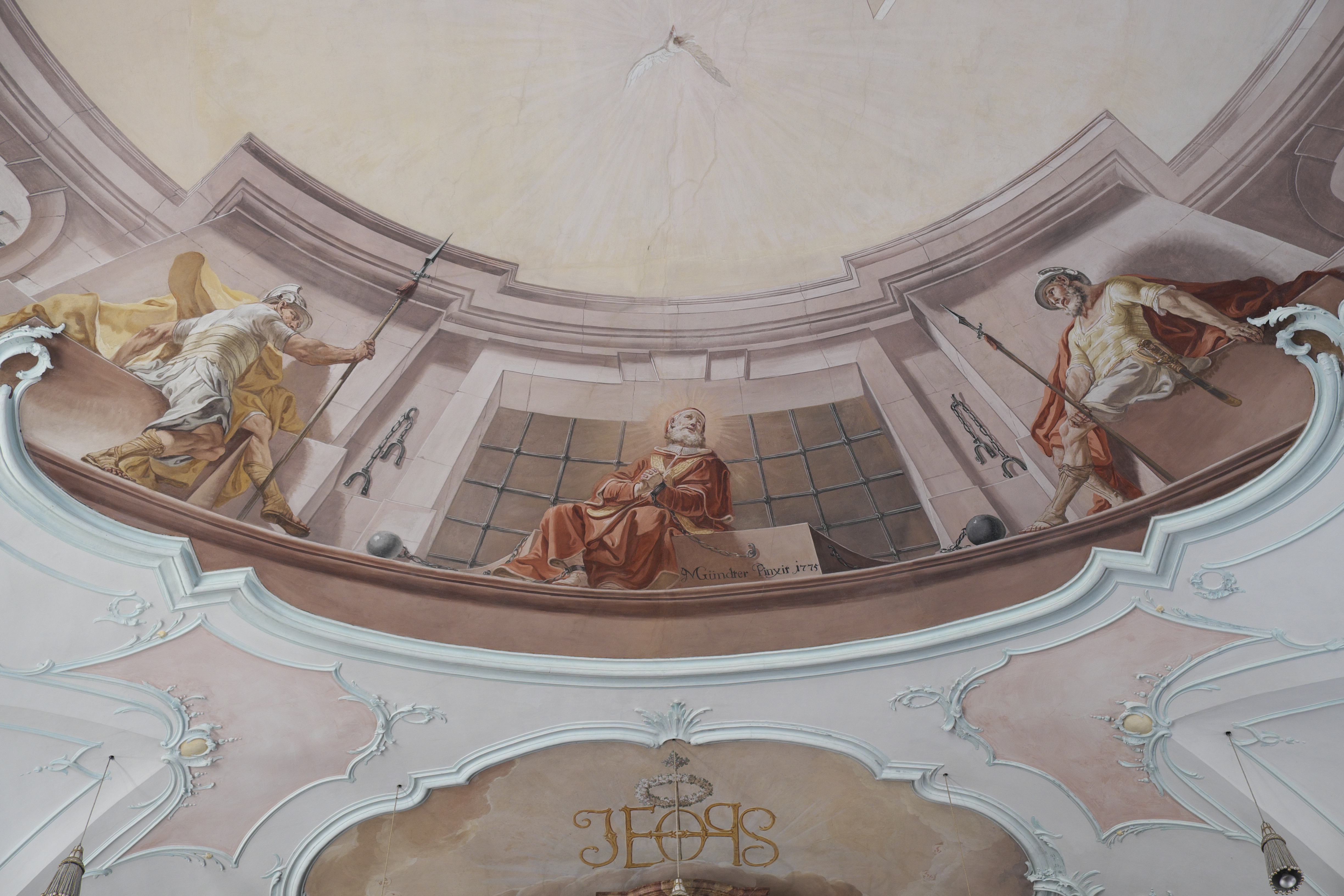 Katholische Pfarrkirche St. Sixtus in Moorenweis im Landkreis Fürstenfeldbruck (Bayern/Deutschland), Fresko von Matthäus Günther im Langhaus, von 1775; Darstellung: Kerkerhaft von Sixtus II. (Ausschnitt)